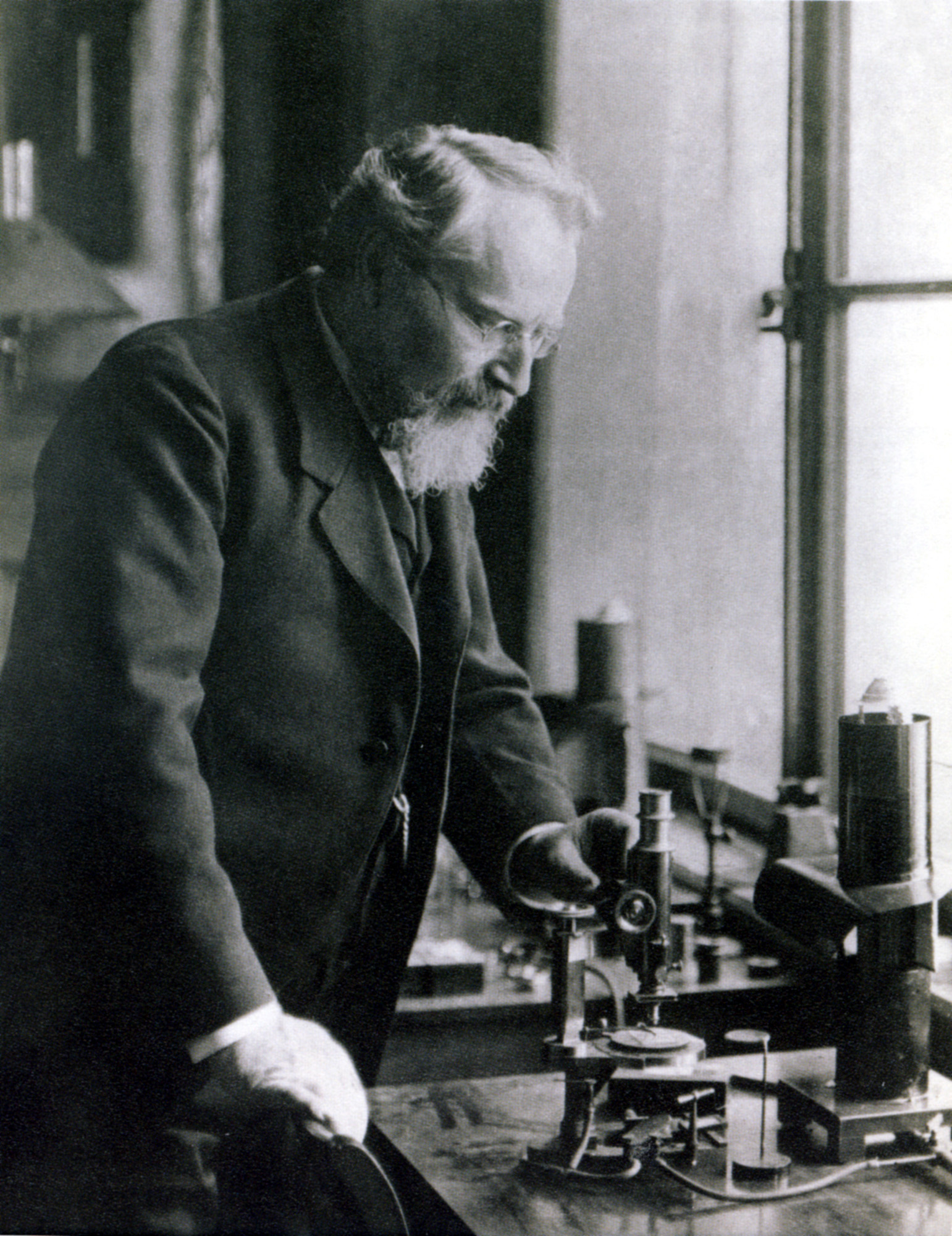 Der deutsche Physiker Otto Lehmann in seinem Labor an der TH Karlsruhe.